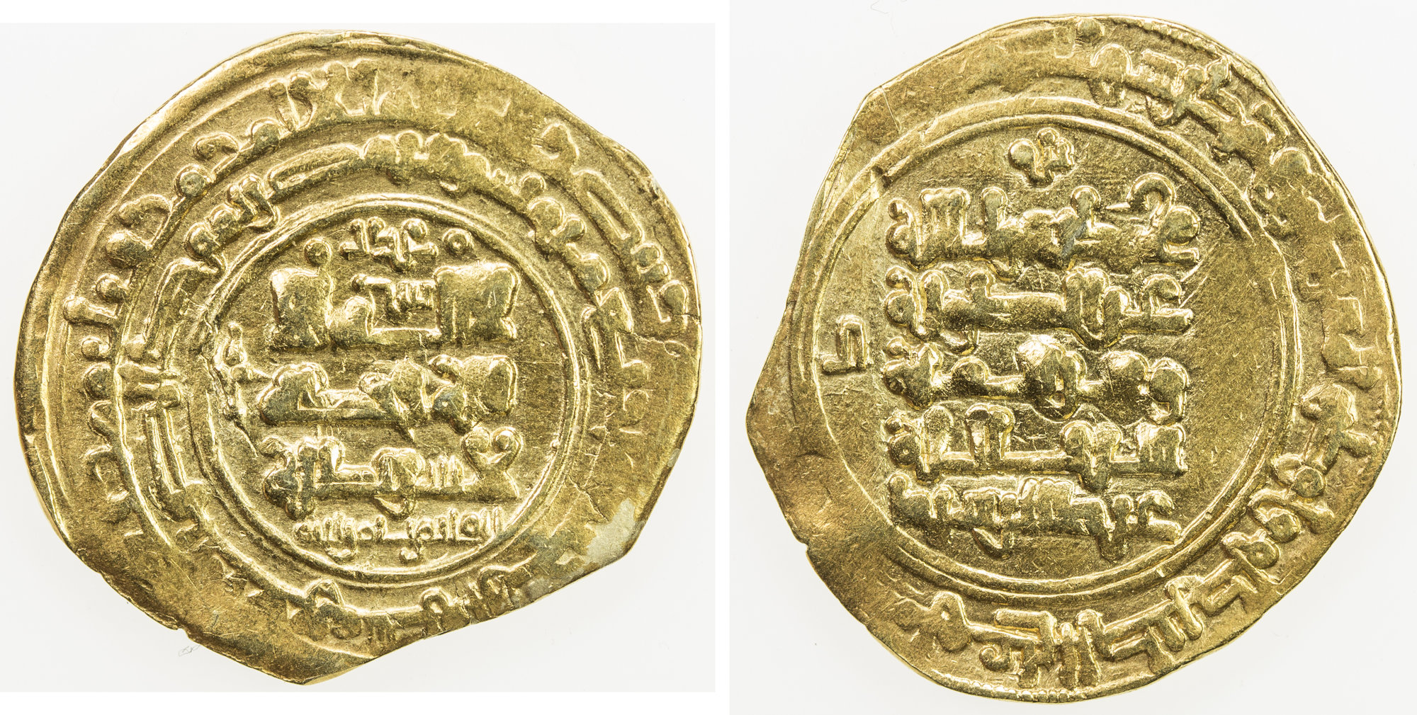 سکه یک دینار عبدالرشید غزنوی